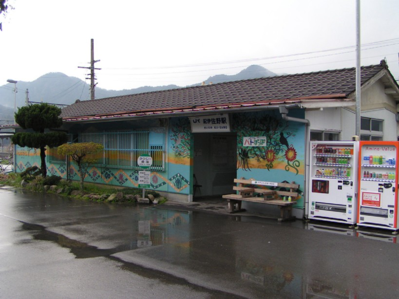 2005/04/03に投稿者が紀伊佐野駅にて撮影。